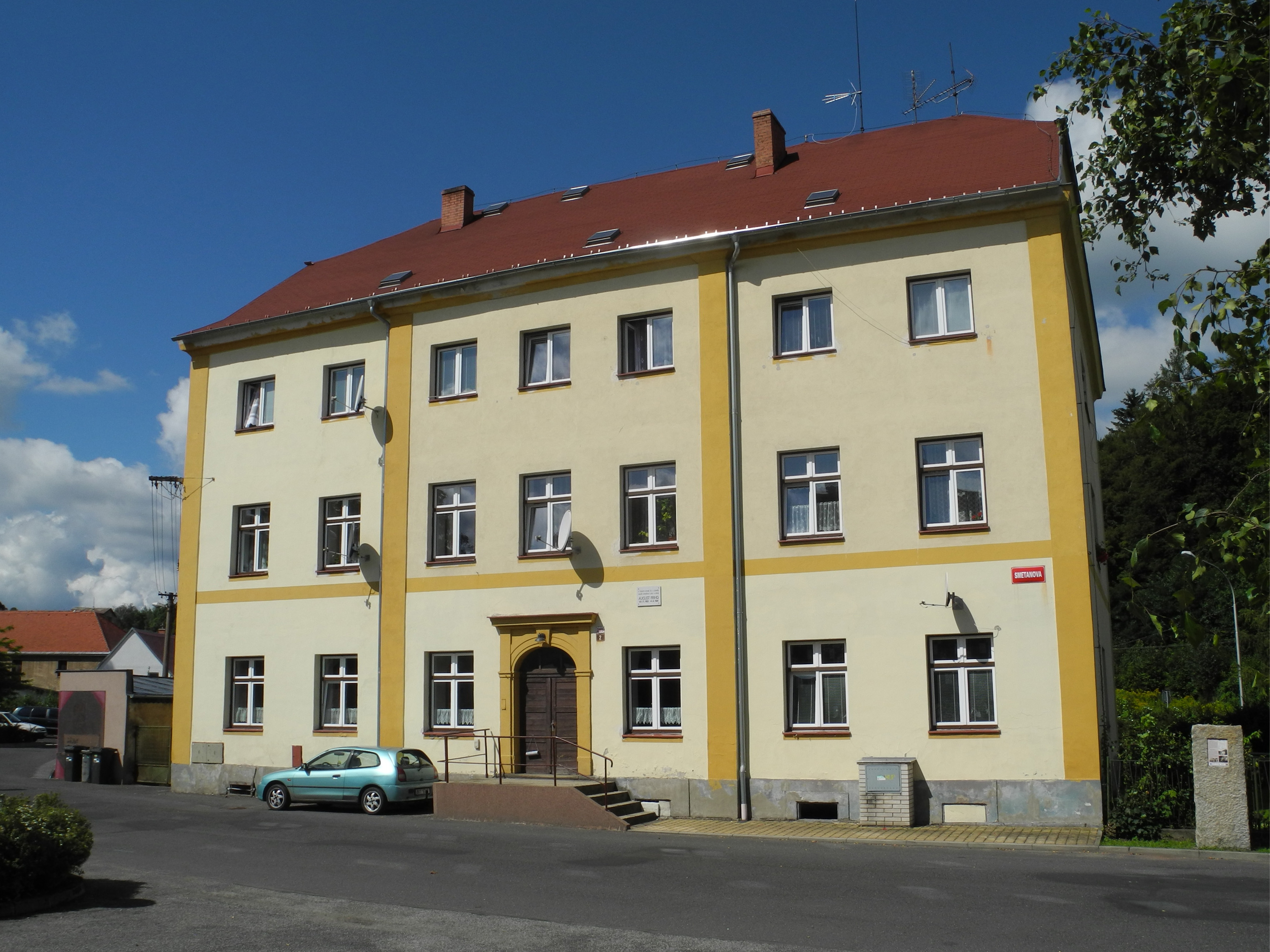 Haus in Krásná Lípa, Smetanova 2, Dittrichova 285/2, Wohn- und Sterbehaus des Malers August Frind (1852–1924)